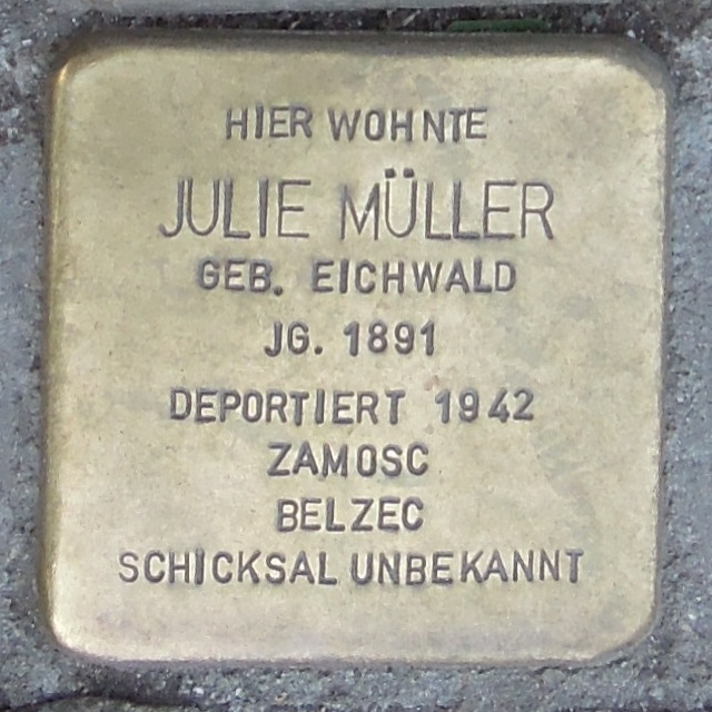 Stolperstein in Soest Brüderstraße 36, Julie Müller